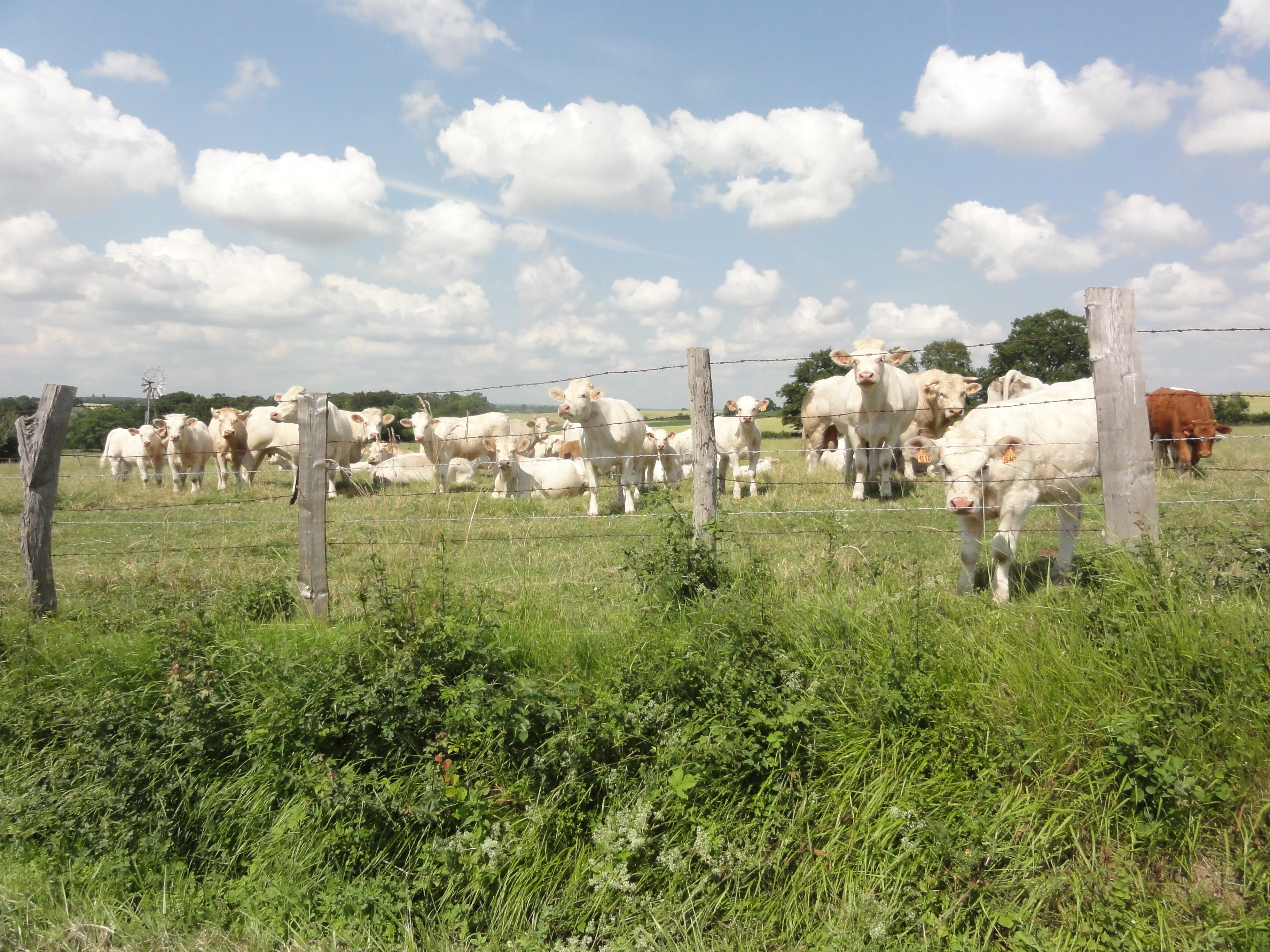 Piacé (Sarthe) La Morillonnerie, paysage avec vaches, au fond une turbine aérienne